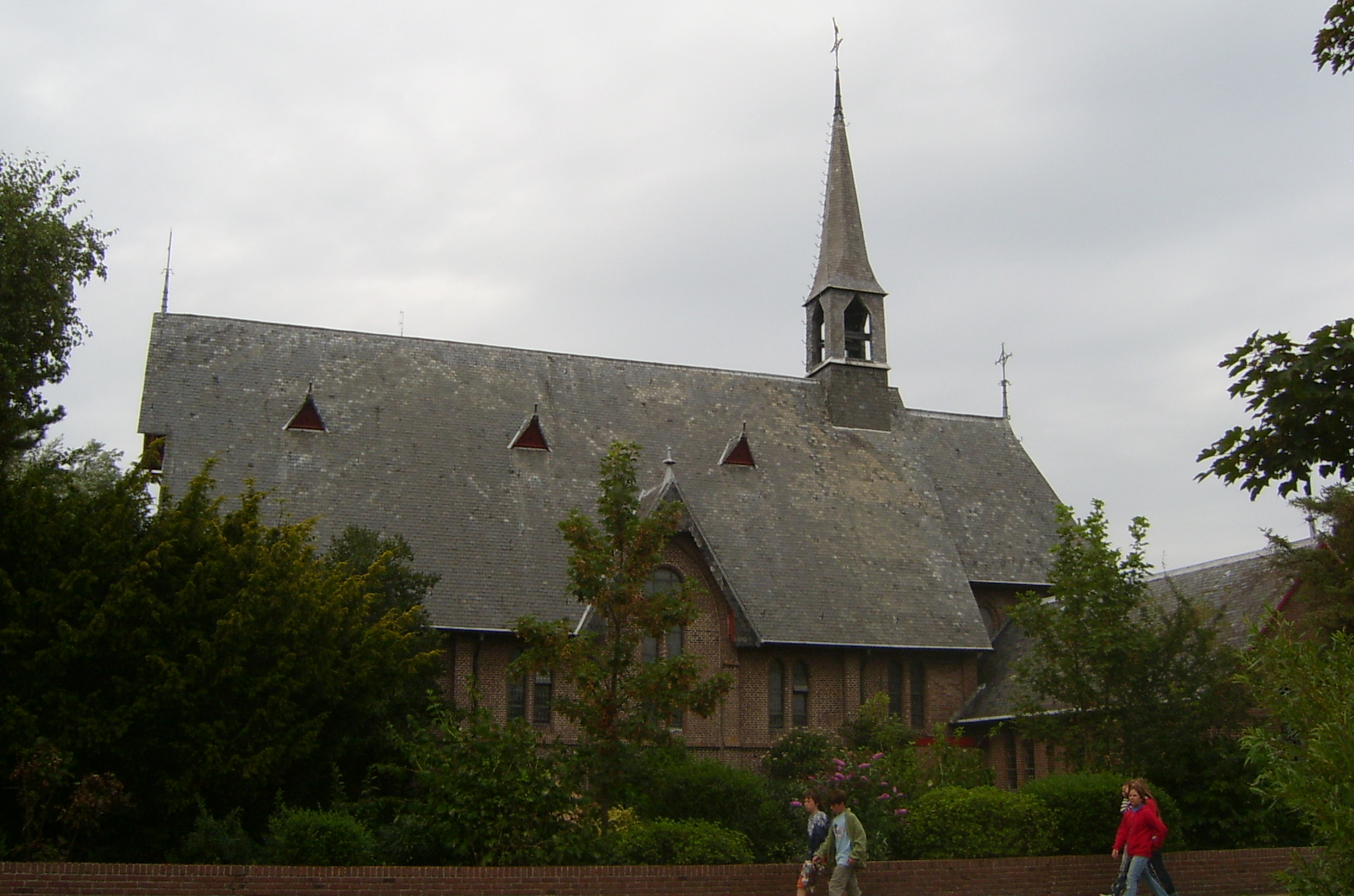 RK kerk Nes Ameland